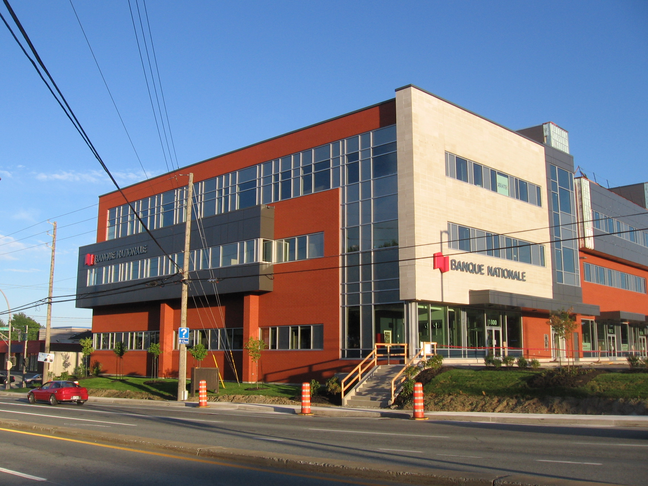 Premier édifice de la Cité du Parc, complexe commercial situé à l'intersection des rues King et Jacques-Cartier, à Sherbrooke, Québec.